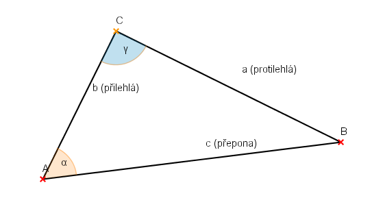 Pravoúhlý trojúhelník s pravým úhlem při vrcholu C. Vytvořeno v programu GEONExT.